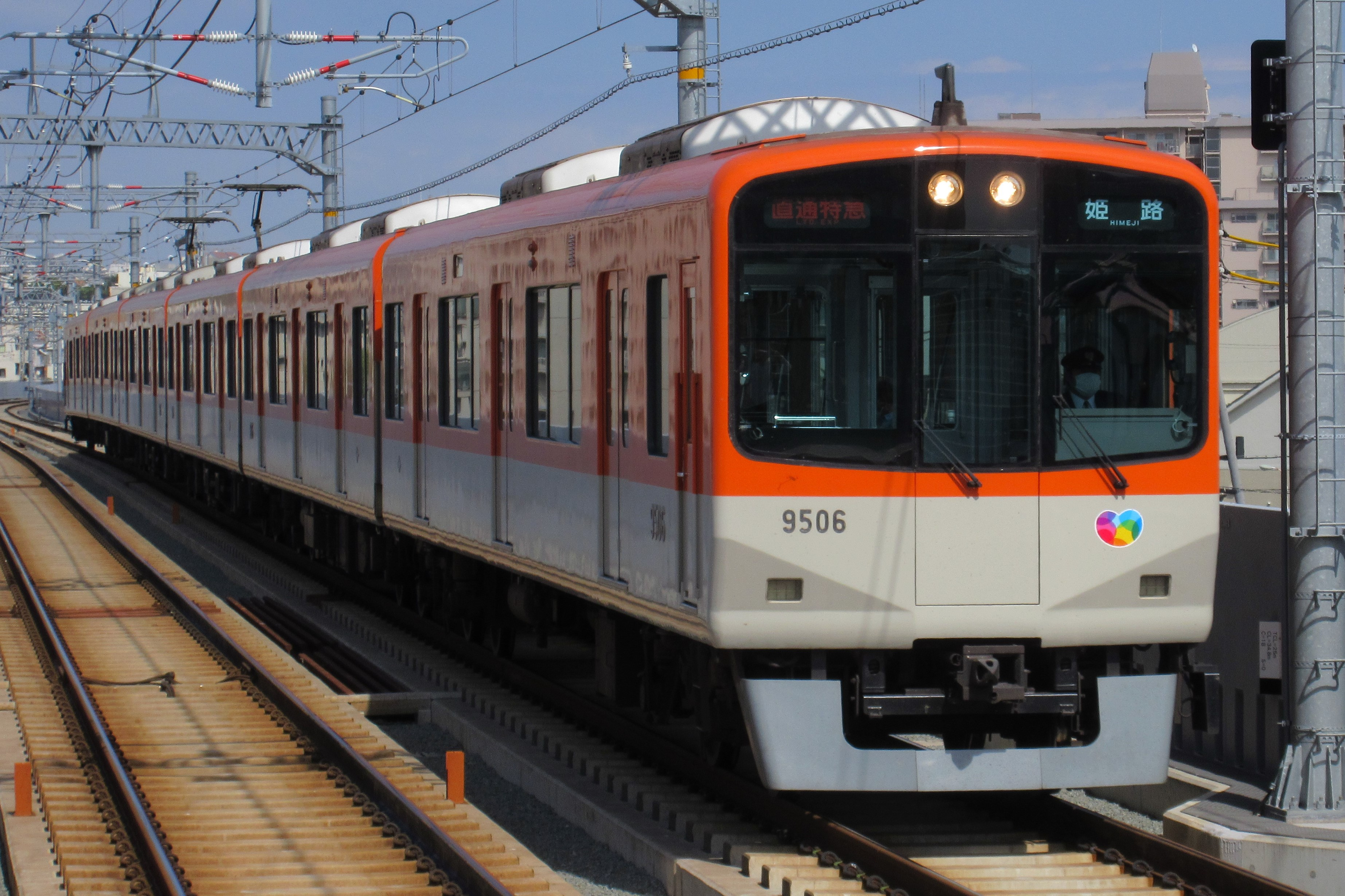 阪神電鉄9506(西新町駅にて)